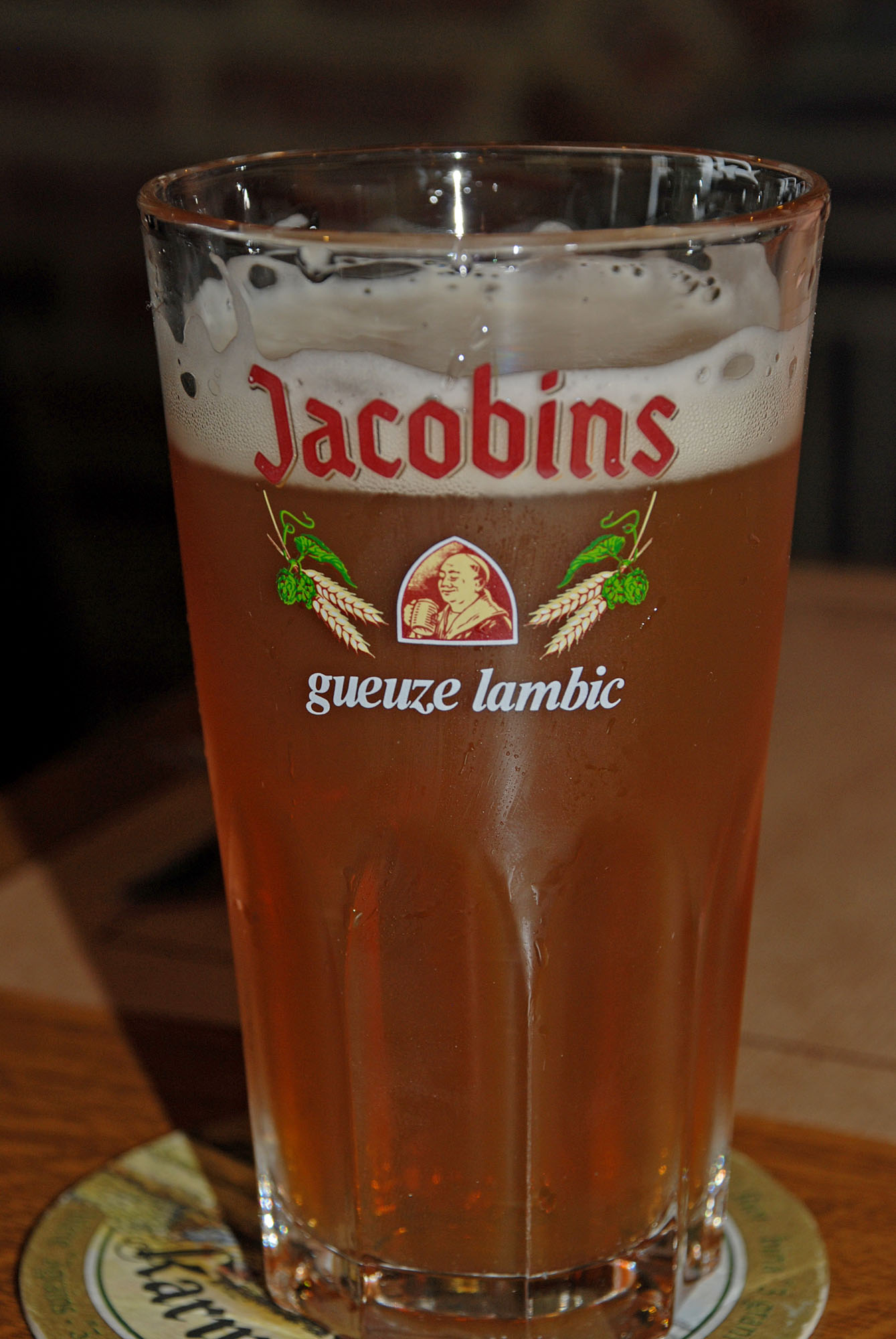 Geuze Jacobins